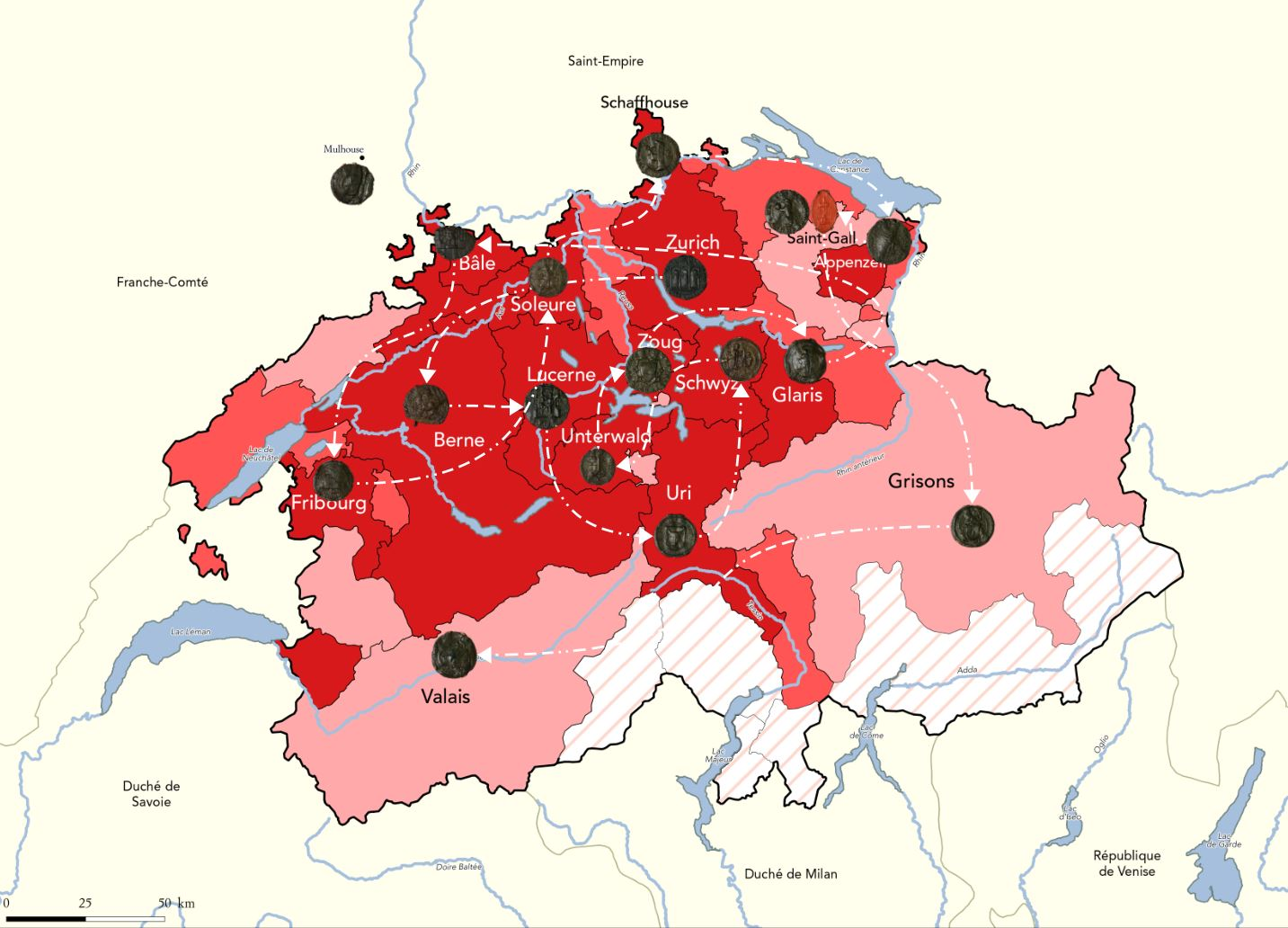 Carte représentant l'ordre de scellement par les cantons suisses et leurs alliés du traité, faisant ainsi apparaître l'itinéraire des deux exemplaires du traité.